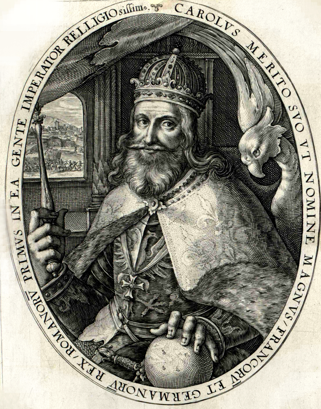 Karl I., der Große, römischer Kaiser